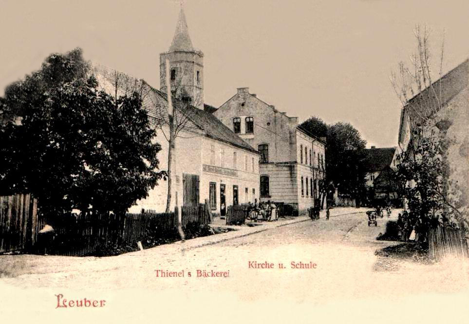 Centrum miejscowości na przełomie wieków XIX i XX. W pierwszym domu z lewej strony mieściła się piekarnia, następny budynek to szkoła, a ponad nimi wieża kościoła św. Jakuba Starszego. Widokówka t tym zdjęciem była w obiegu pocztowym w roku 1904.